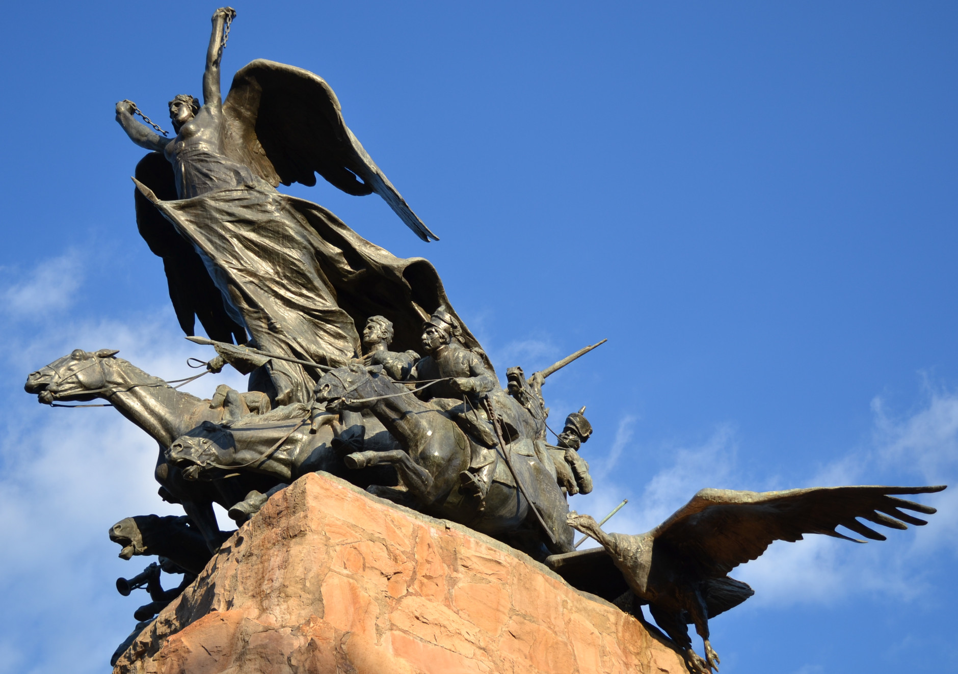 Monumento al Ejercito de los Andes (Cerro de la Gloria). Detalle lado Oeste sección superior (la Libertad, Regimiento, Cóndor)